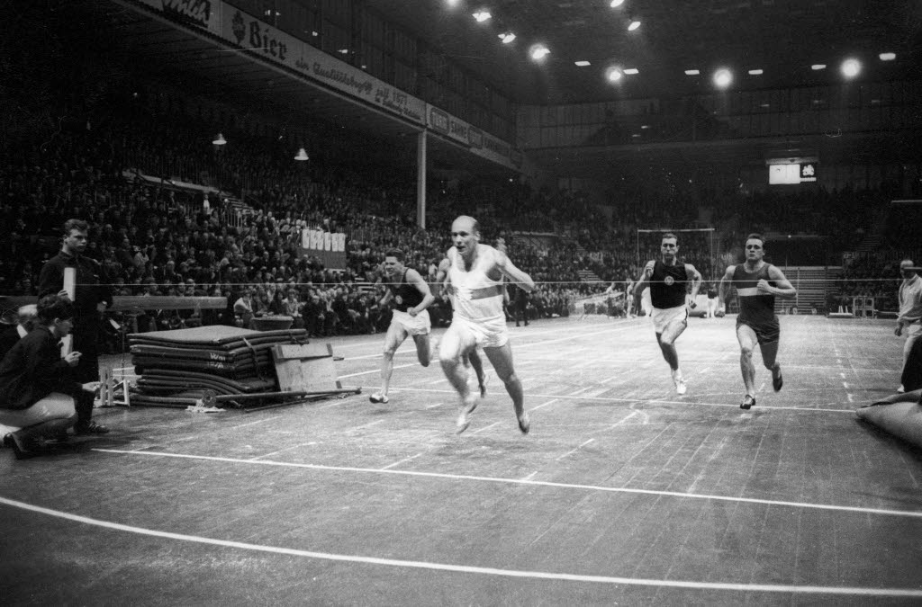 Sprint. Läufer Willi Holdorf (2.v.l.) gewinnt vor Hirscht (1.v.r.) aus Eutin.